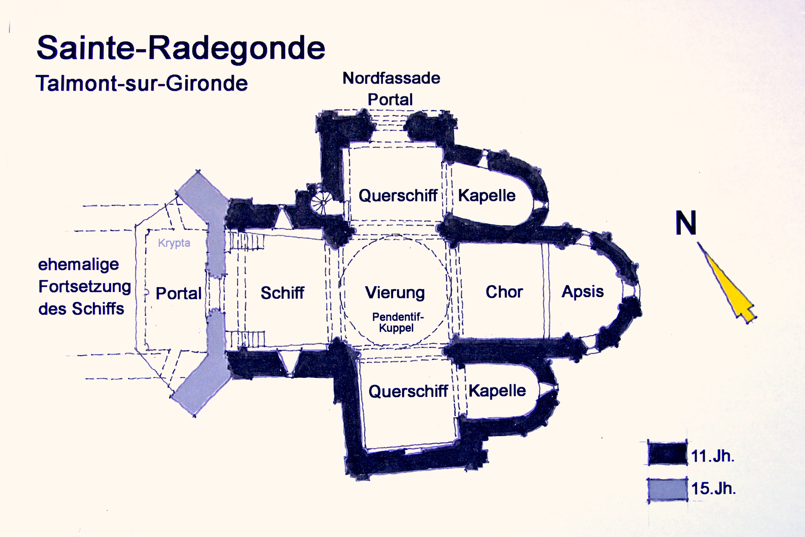 Saint-Radegonde-Talmont-sur-Gironde